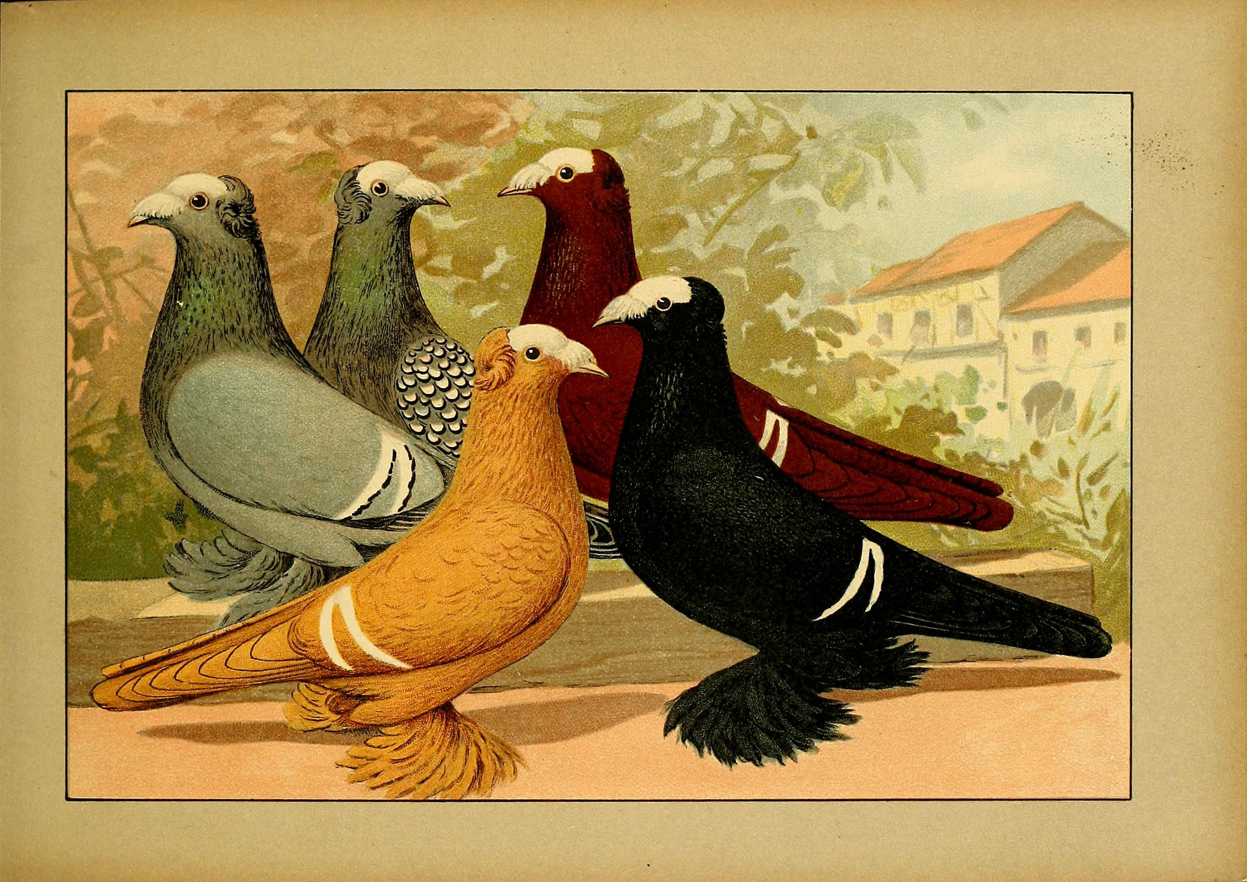 Deutsch